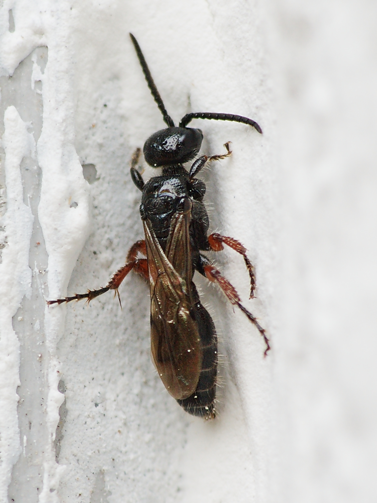 Rollwespe, Tiphia femorata. Fundort Mittelfranken